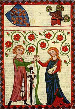 Trobador